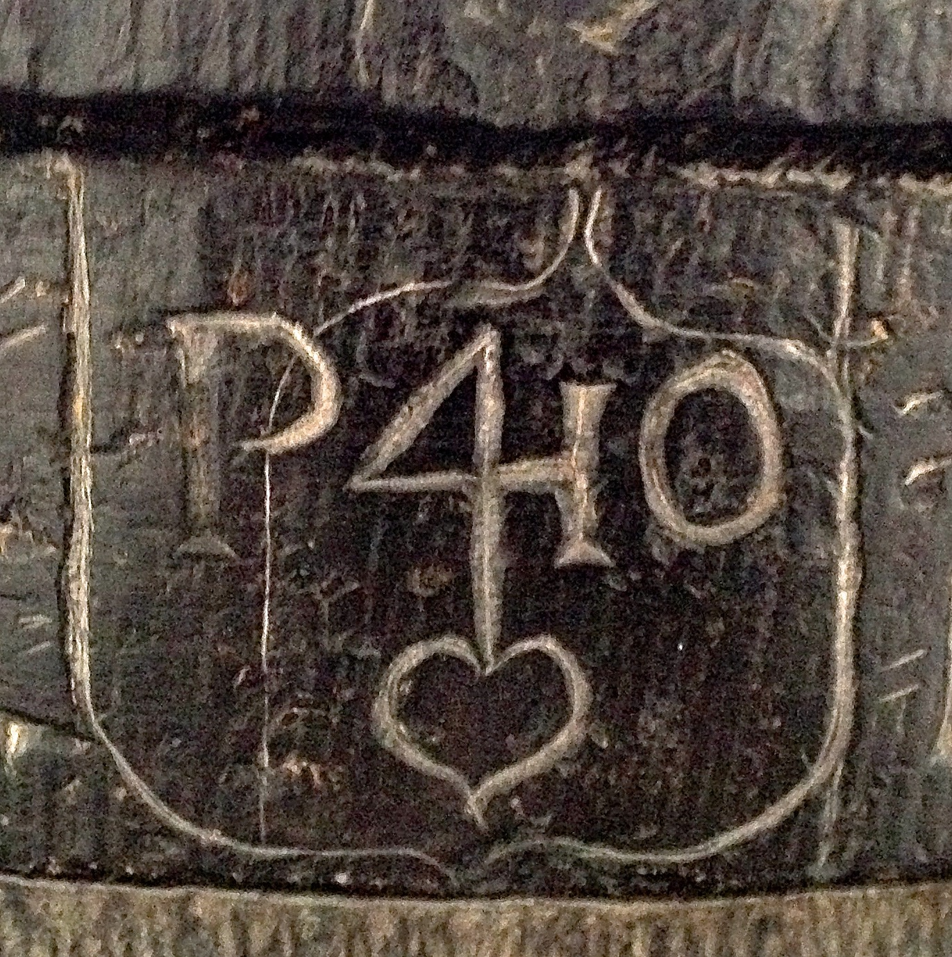 Detail der Gravur am Taufstein (1683); Hausmarke